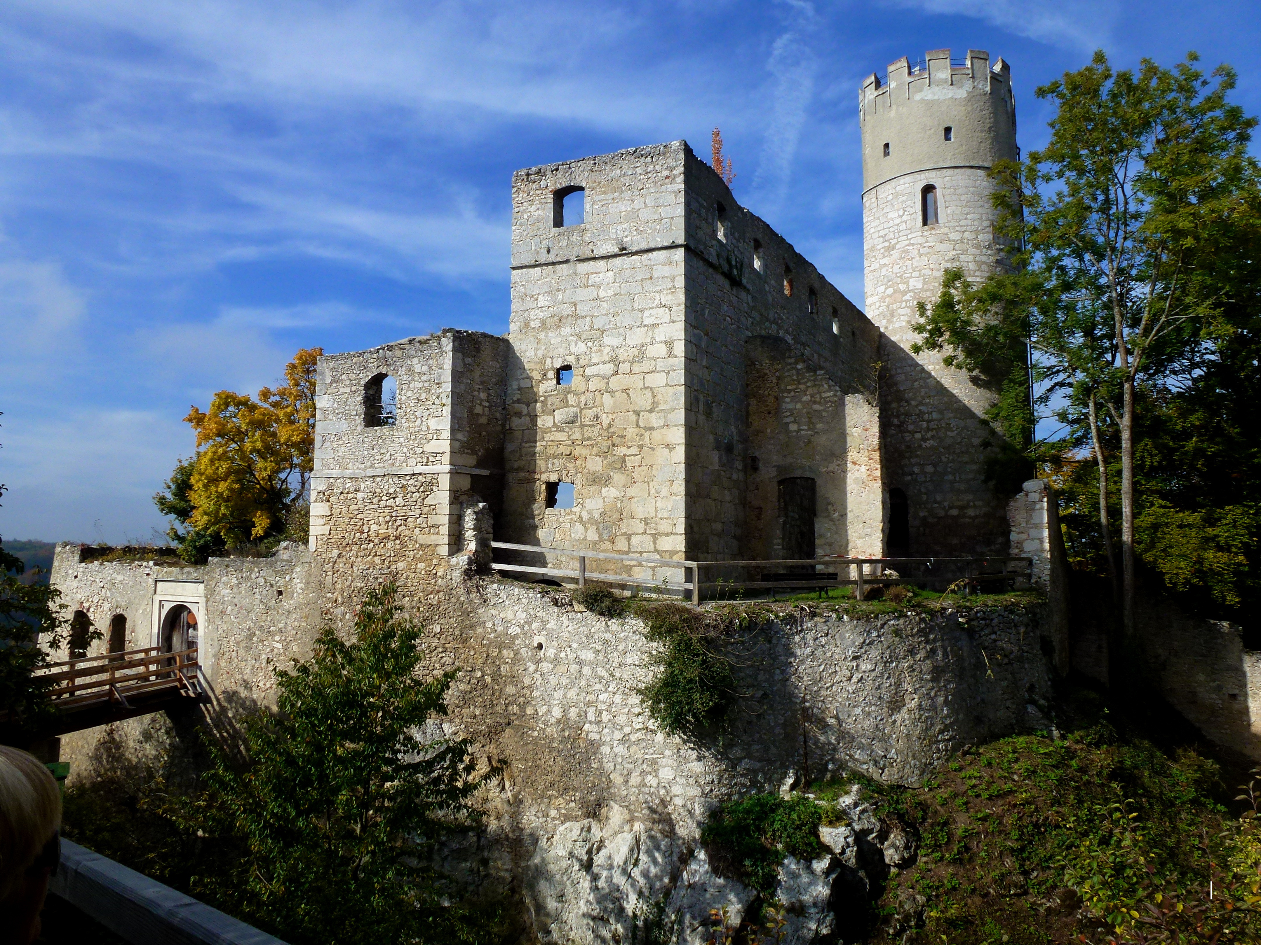 Hoch über Essing steht die Burg RandeckThis is a photograph of an architectural monument.